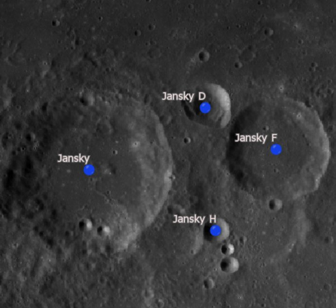 Cráter lunar Jansky. Cráteres satélite. (Imagen LRO)